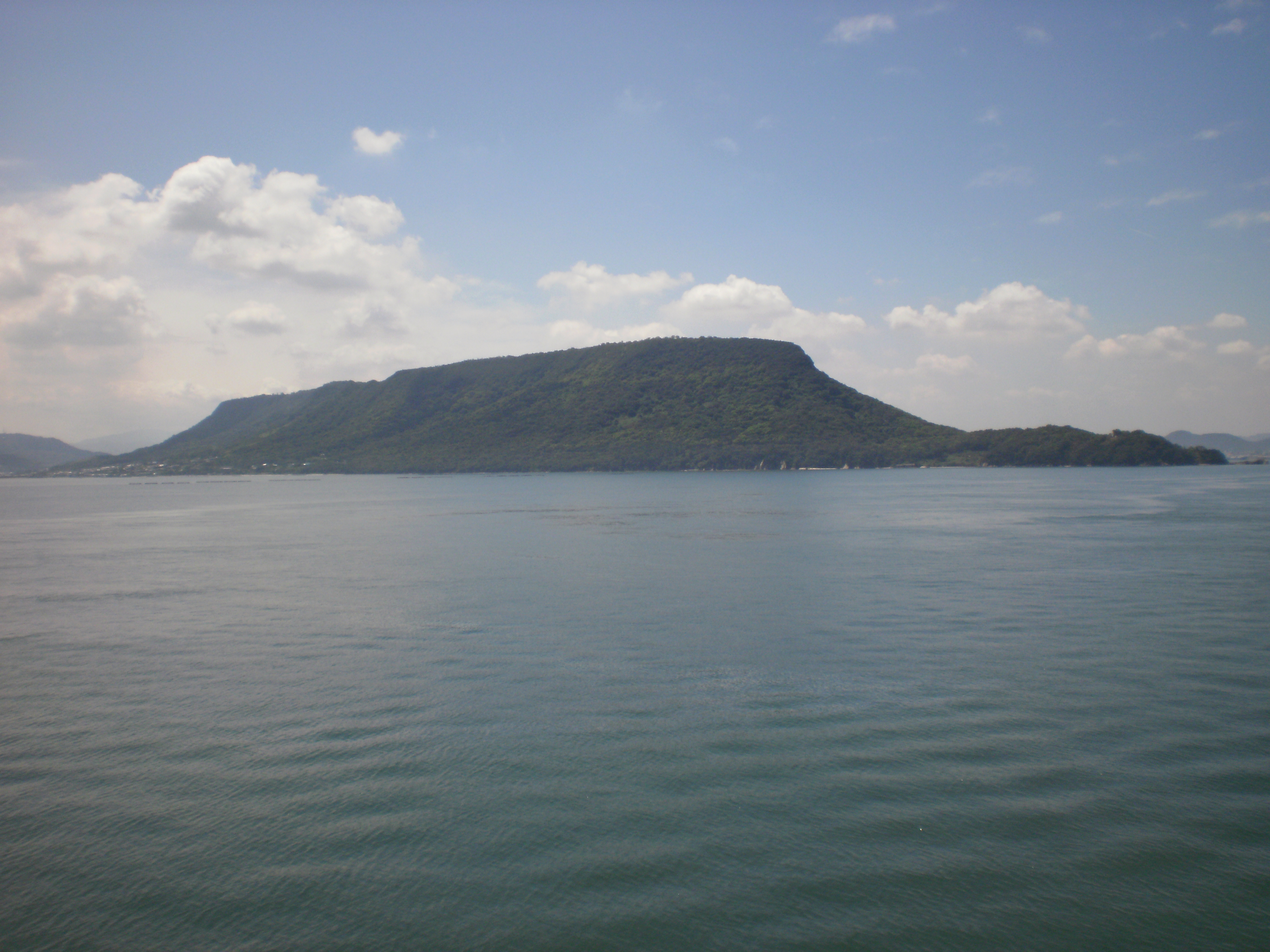 Mt.Yashima From South